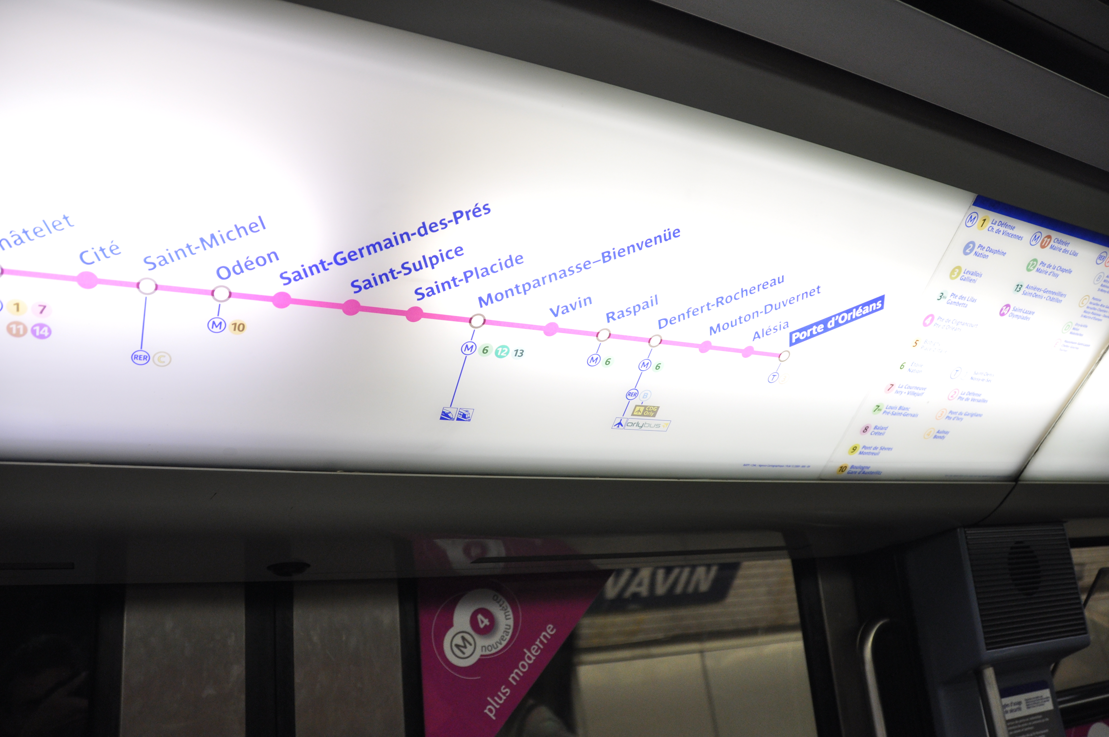 Le MP 89 CC 01 sur la ligne 4 du métro de Paris.